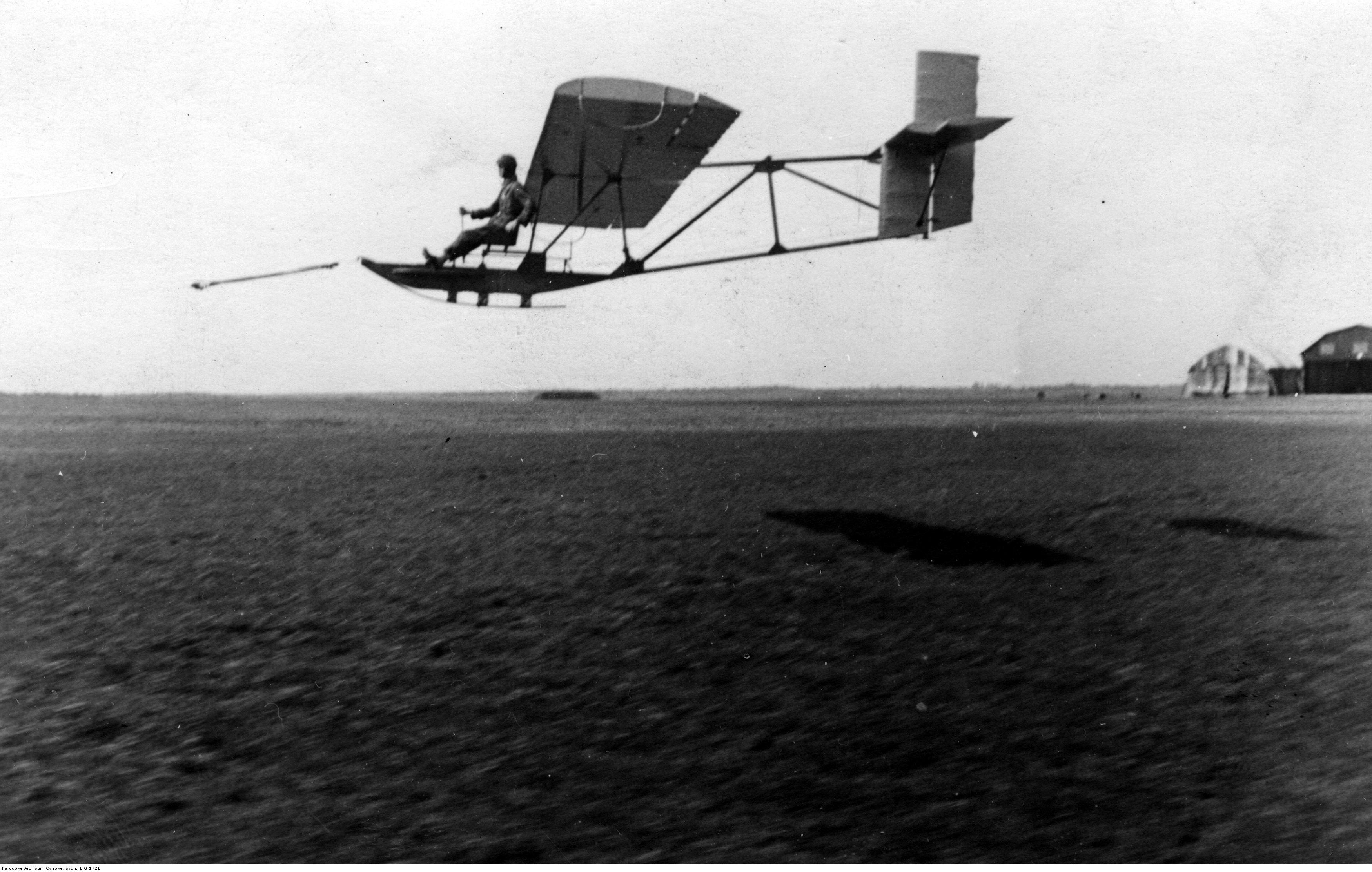 Prototyp szybowca CW-III nad lotniskiem w Skniłowie